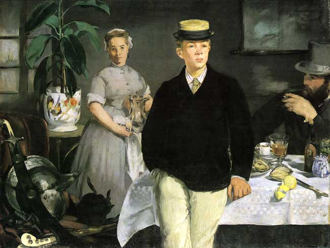 L'homme au premier plan est le peintre Joseph-Auguste Rousselin